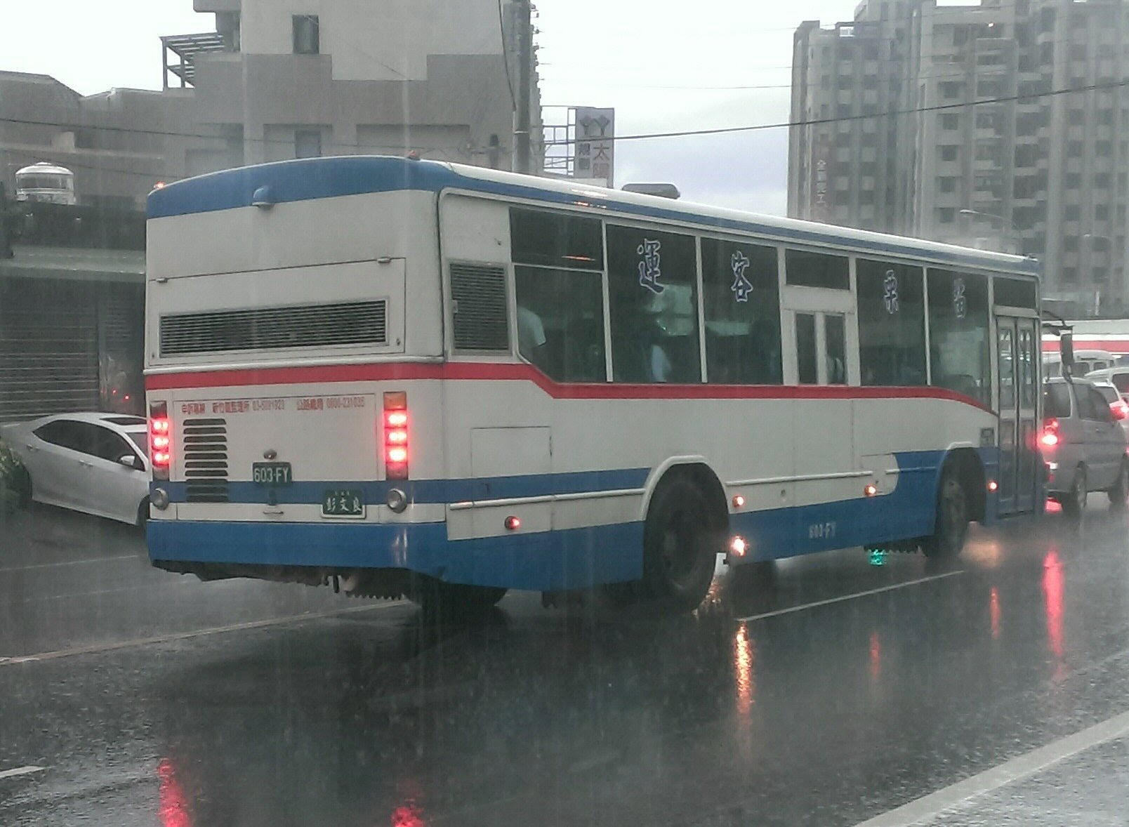 雨中的苗栗客運2006年日野ERK2JML大客車603-FY執行5806往竹南